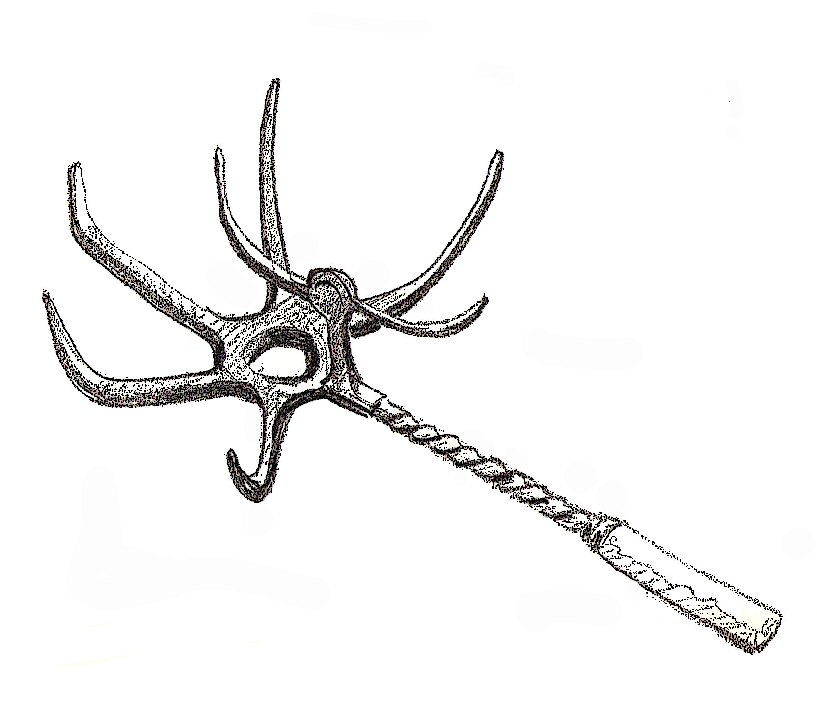 Croquis d'une broche à rôtir étrusque - musée civique de Chianciano Terme